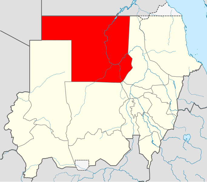 Locator map